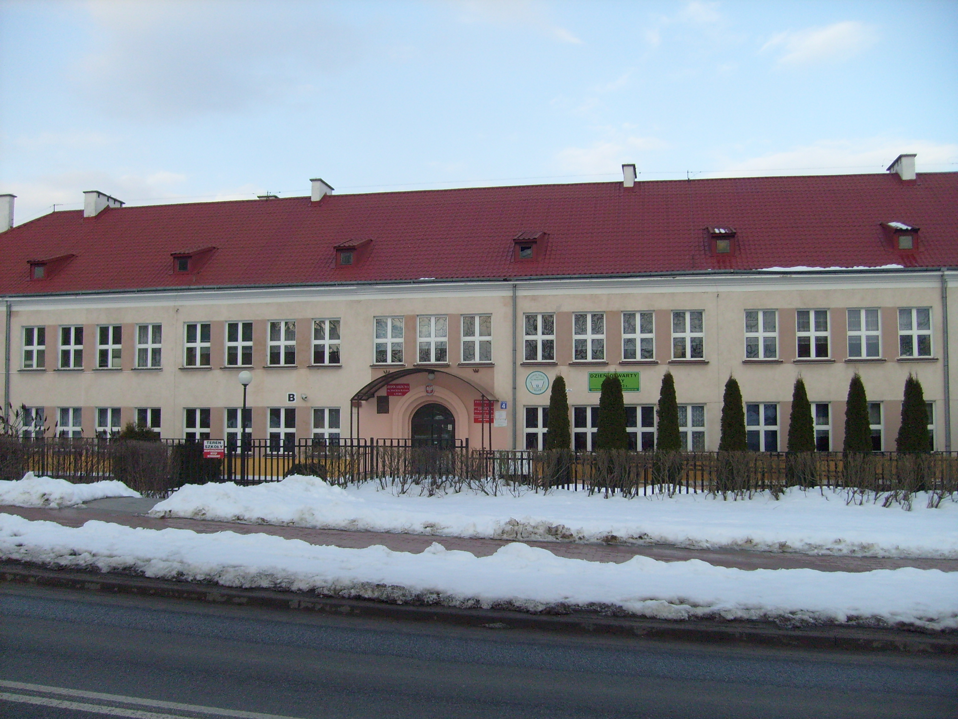 Budynek B Zespołu Szkół nr 6 im. Macieja Rataja w Ełku, stan na kwiecień 2013